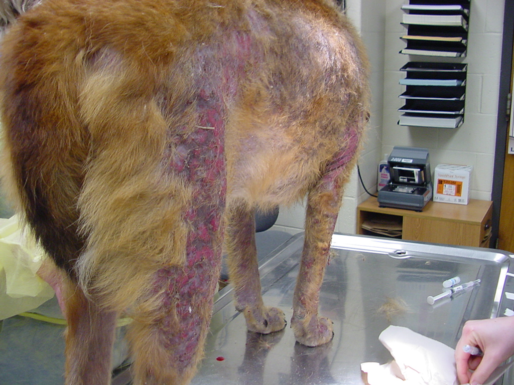 canine pemphigus foliaceus